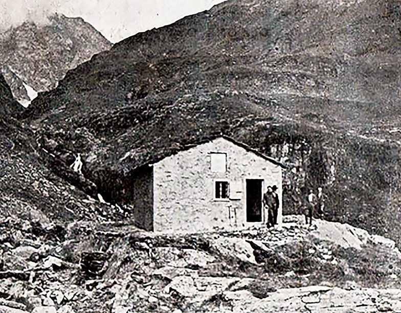 Foto d'epoca che ritrae il primo rifugio Coca